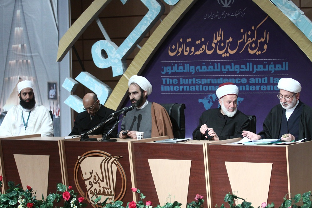 الجلسة الافتتاحية من الدورة الأولى للمؤتمر الدولي للفقه والقانون